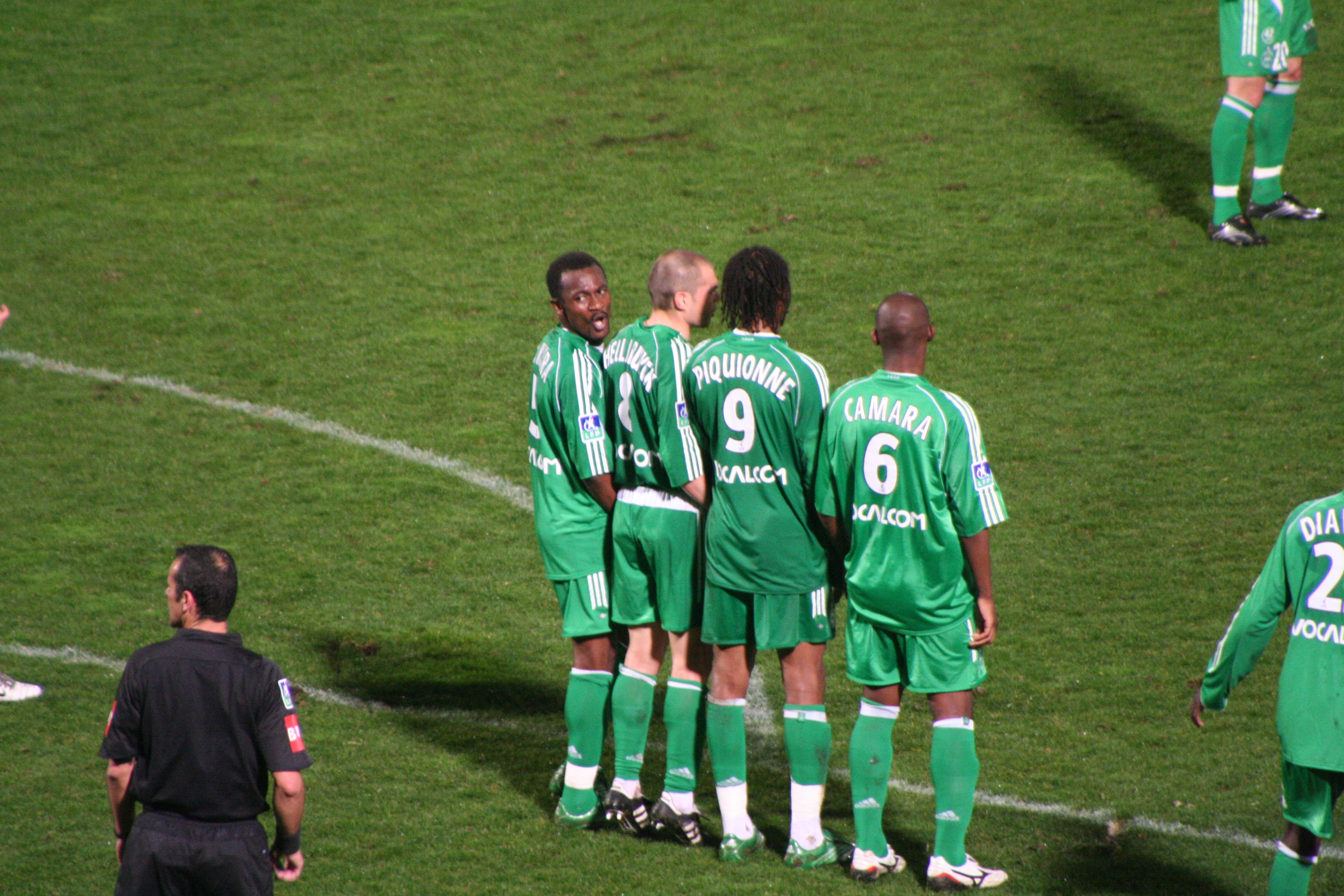 AJ Auxerre-Association sportive de Saint-Étienne Loire 2005-2006